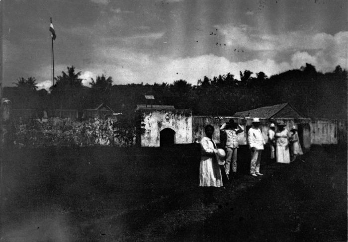 Foto. Fort te Sanana, Soela-eilanden.